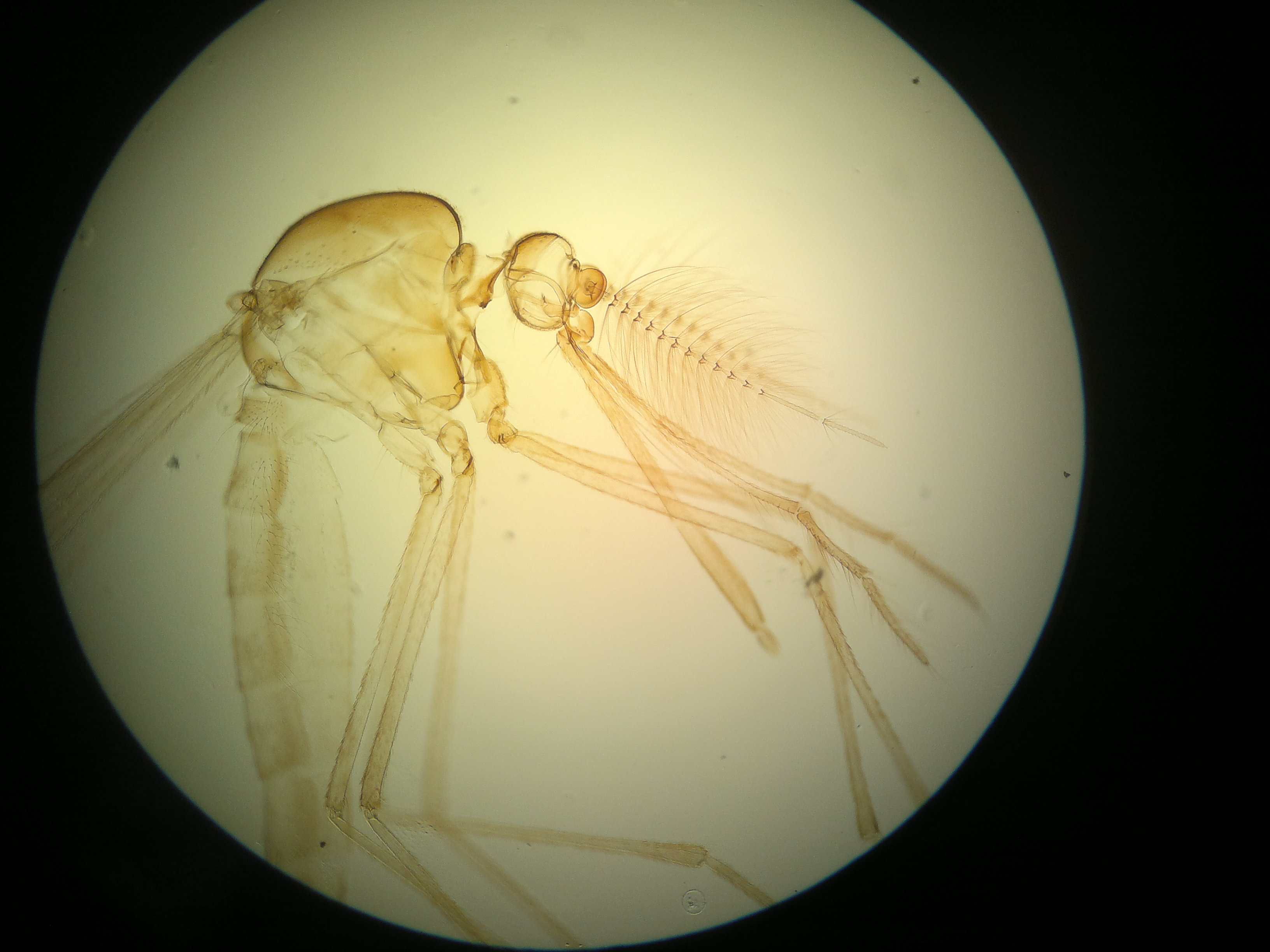 تصویری میکروسکوپی از پشه آنوفل نر